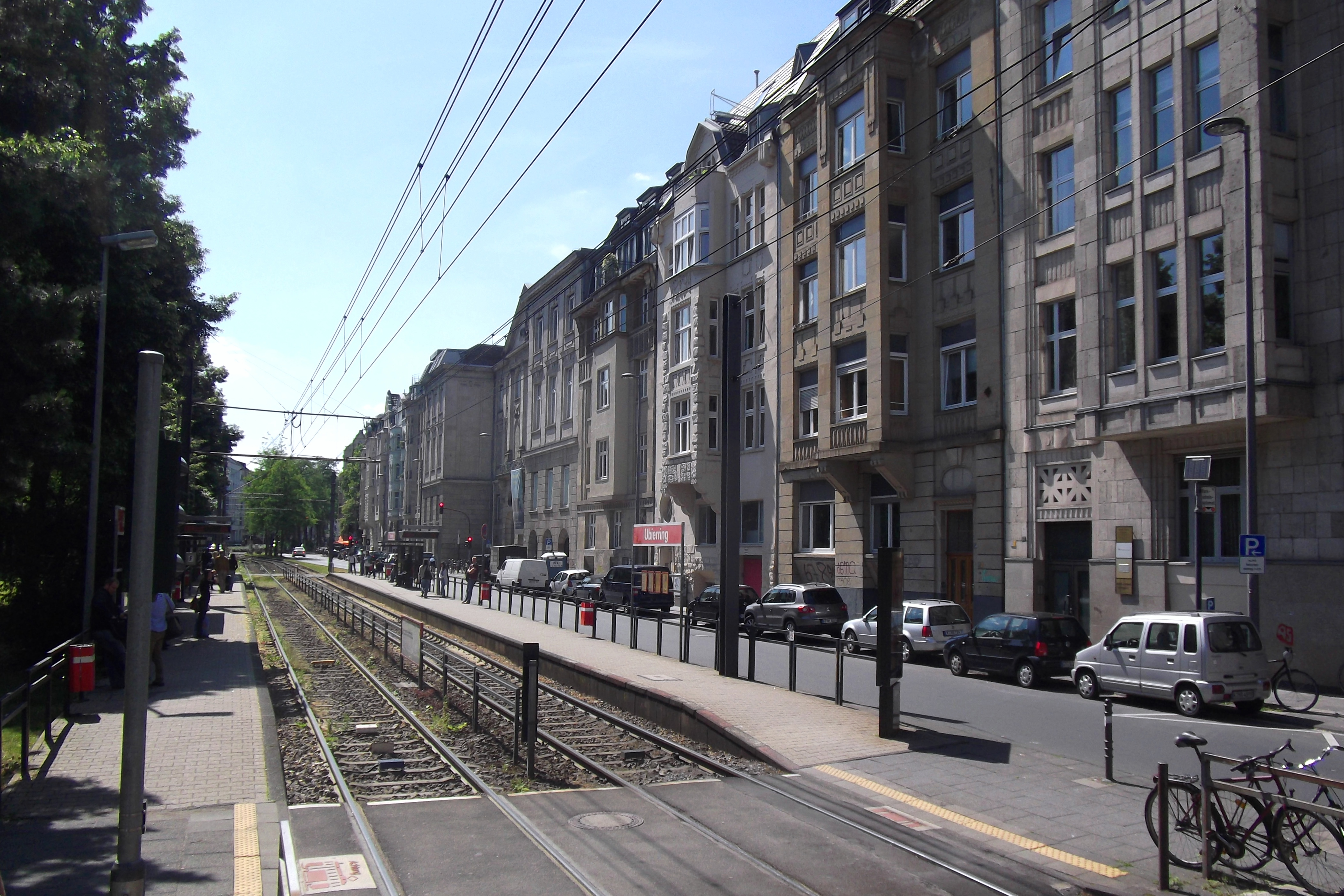 Cologne (Köln); Germany: Köln-Altstadt-Süd: Ubierring KVB station